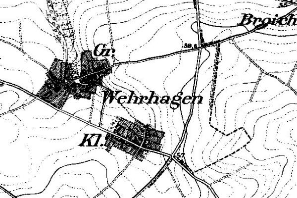 Neuaufnahme 1891 -1912